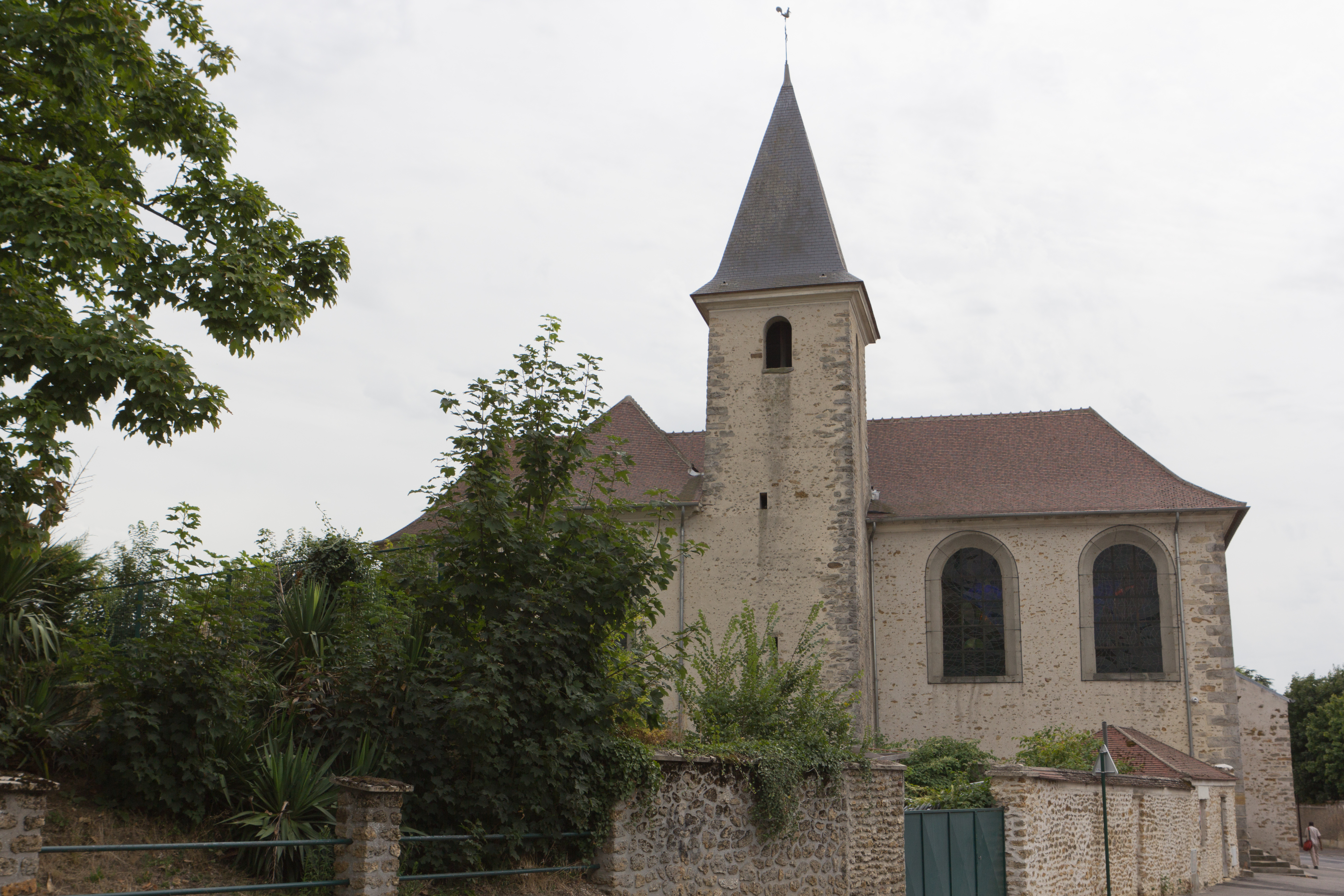 L'église de Fleury-Mérogis, commune de Fleury-Mérogis, département de l'Essonne. France.